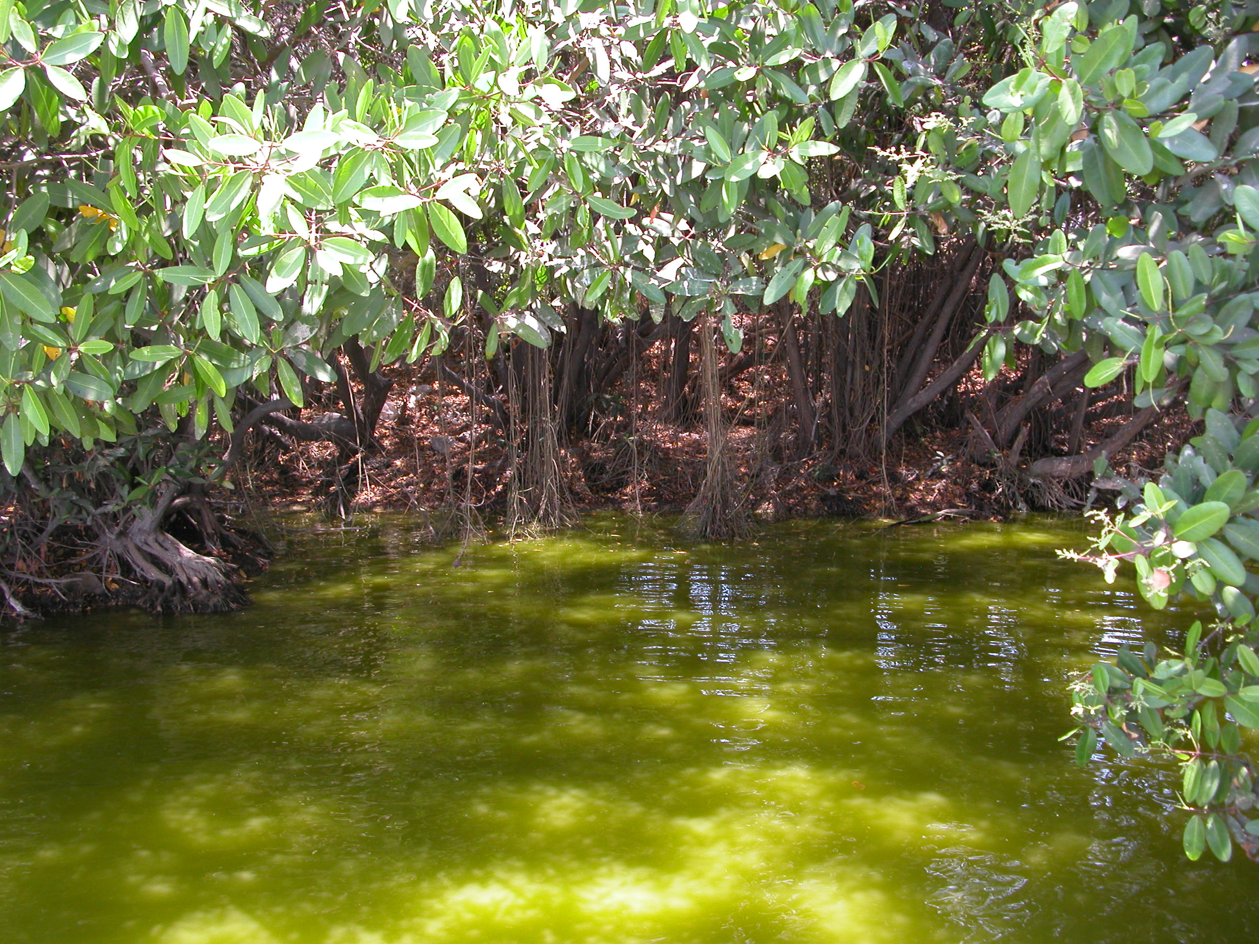 Manglares en la Laguna de las garzas, Manzanillo, Colima, México durante una investigación escolar en busca de copípedos y moluscos vivaldos en el mar.